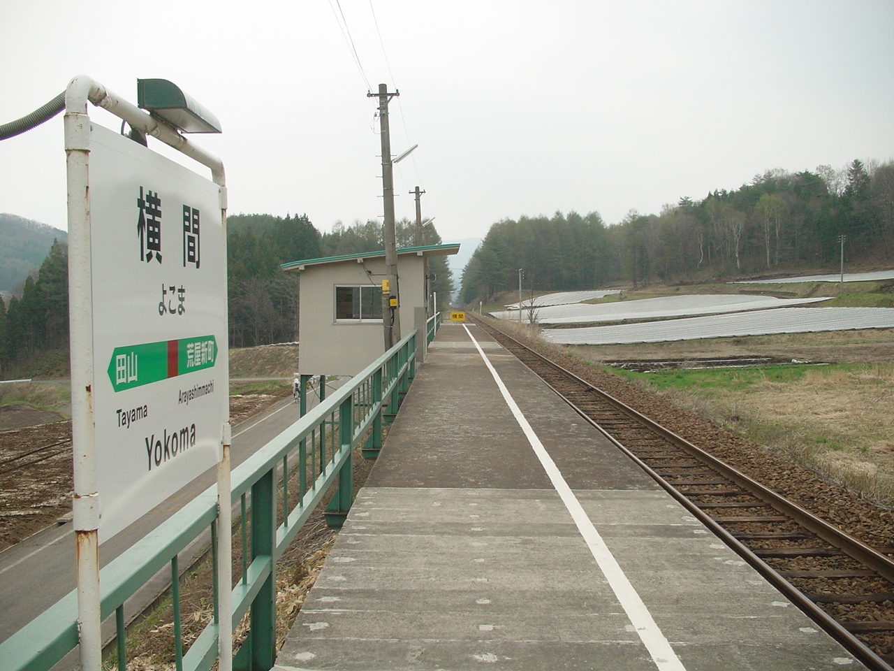 （横間駅）